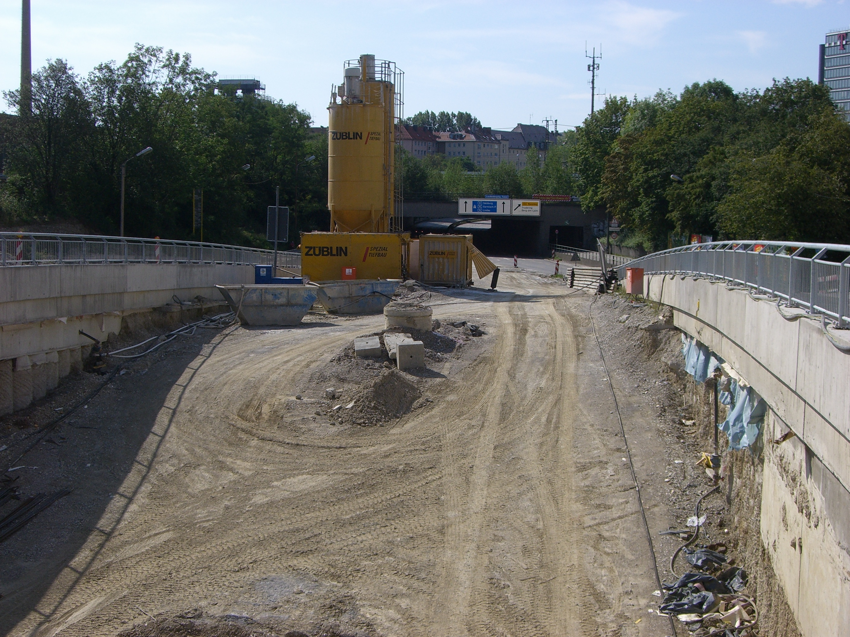 München - Mittlerer Ring - Leuchtenbergring (Tunnelausfahrt).jpg